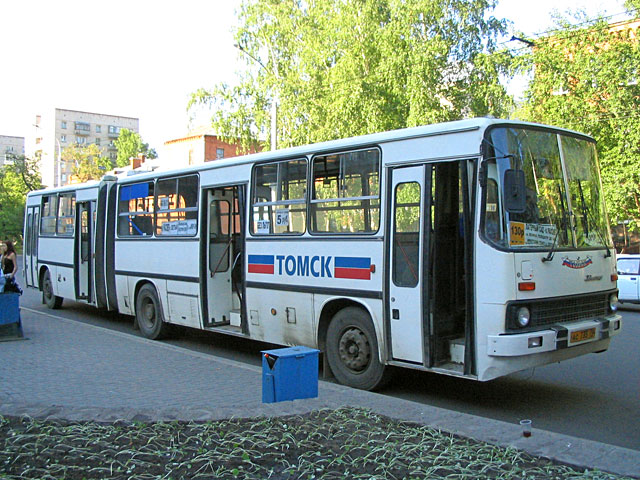 Bus Ikarus-280.00 in Tomsk